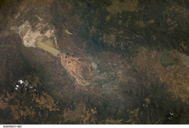 Laguna de Sayula en imagen Satélital.